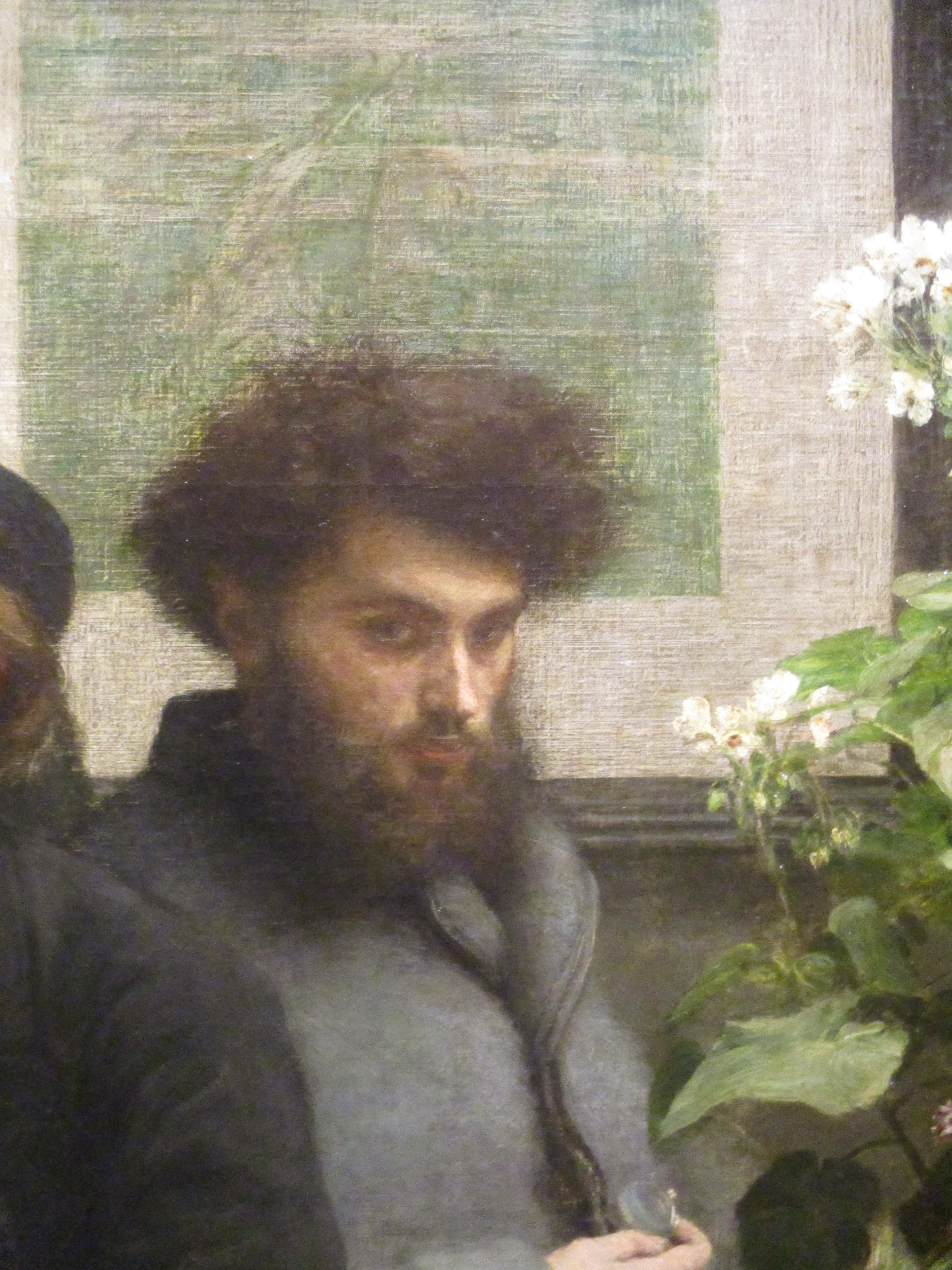 Henri Fantin-Latour: détail du tableau Un coin de table (1872) avec Camille Pelletan. Musée d'Orsay.